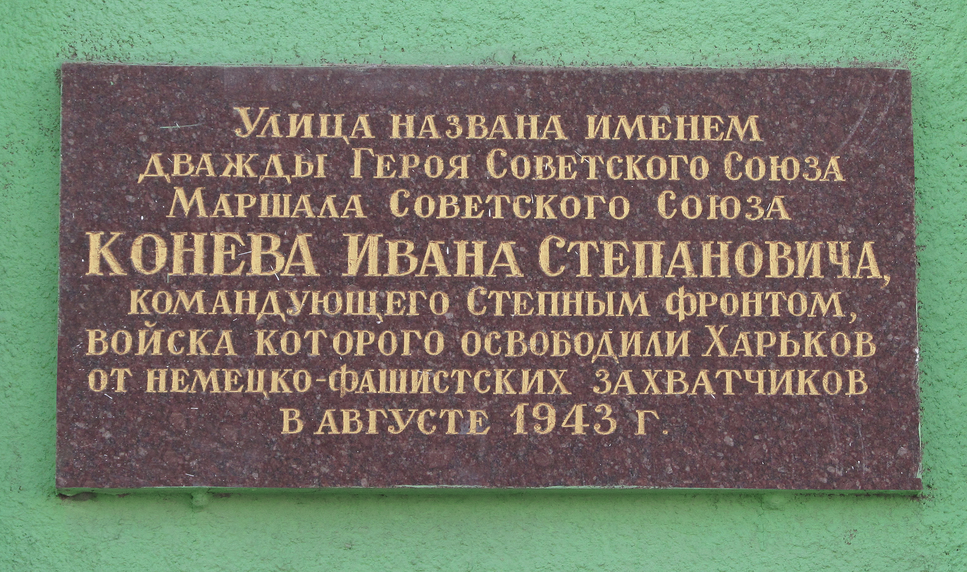 Анотаційна дошка вулиці Маршала Конєва (Харків, вул. Конєва, 2)